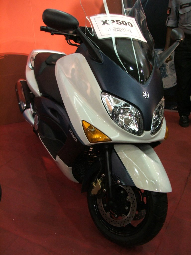 Yamaha XP500 @ 2006-07 Ceylinco motor-show